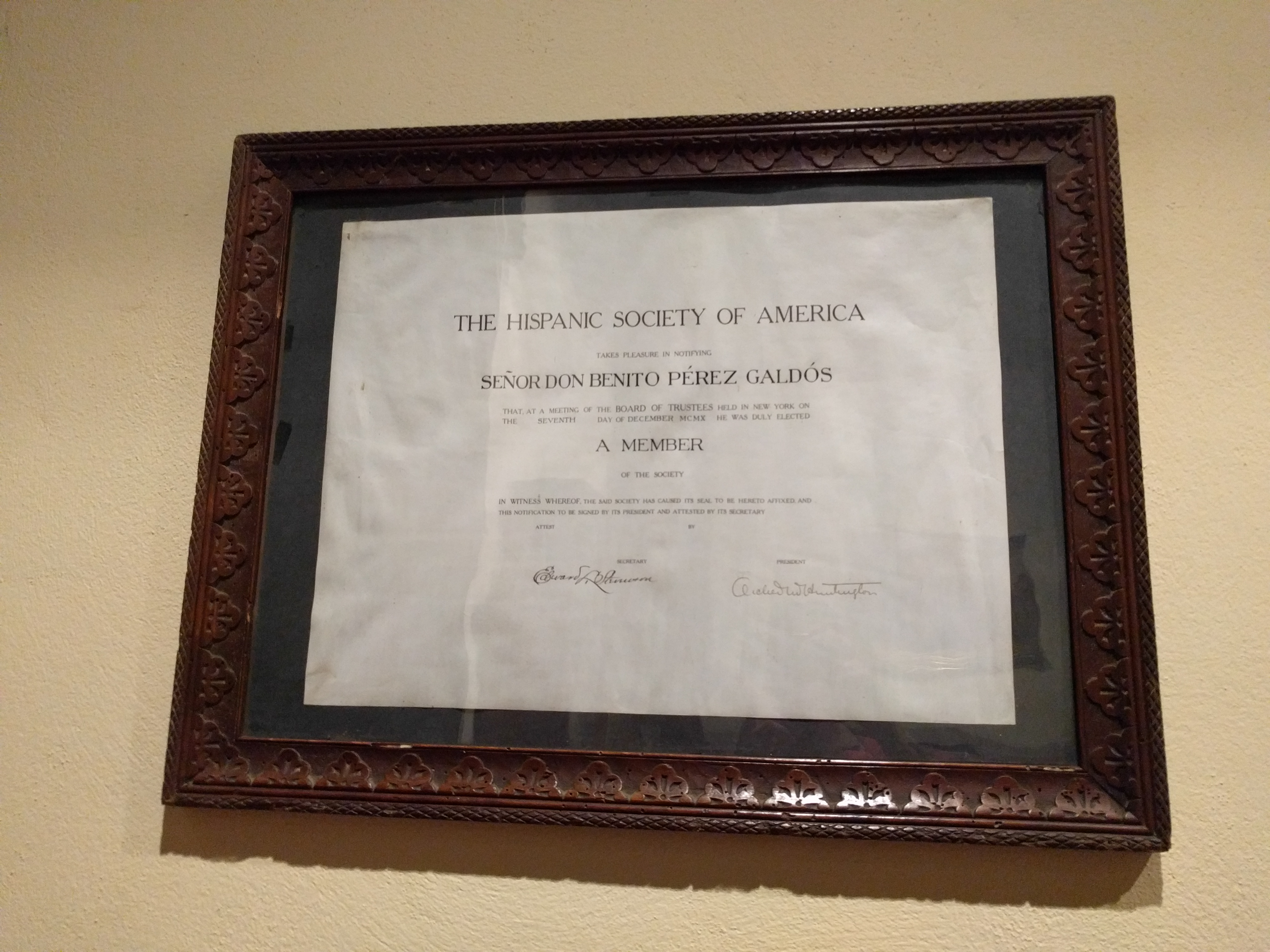 Certificado de miembro de la Hispanic Society of America de Pérez Galdós, Casa-Museo Pérez Galdós